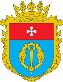 Герб Демидівського району